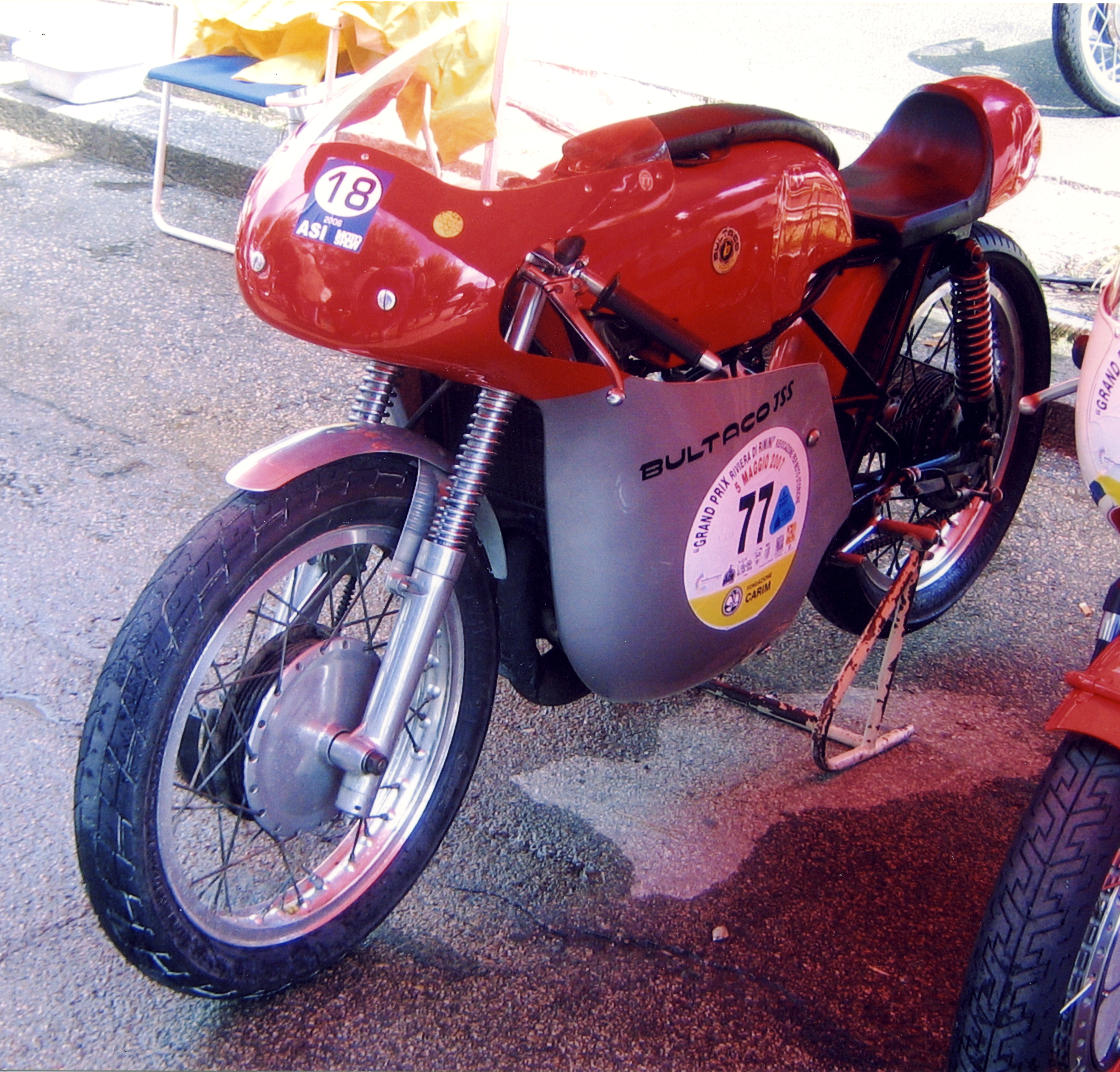 Bultaco TSS Agua, esposta a Rimini durante il Pasolini Day del 2007